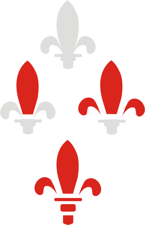 Vektorska slika. Kao što se vidi, ljiljan nije iscrtan odjednom niti iz jednog dijela. Povezivanjem više geometrijskih oblika dobivamo mnogo komplikovaniji oblik.